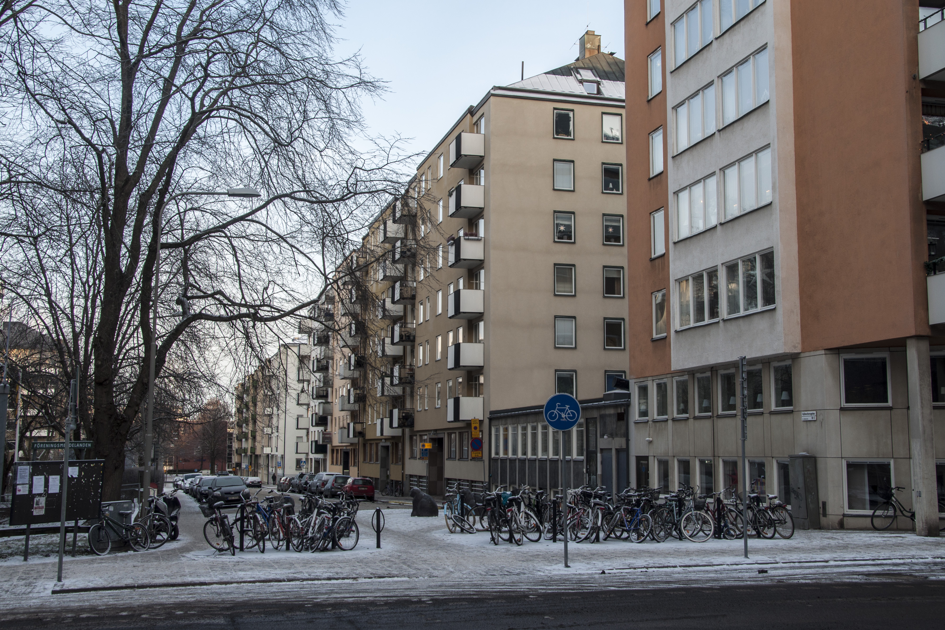 Gyllenstiernsgatan norrut